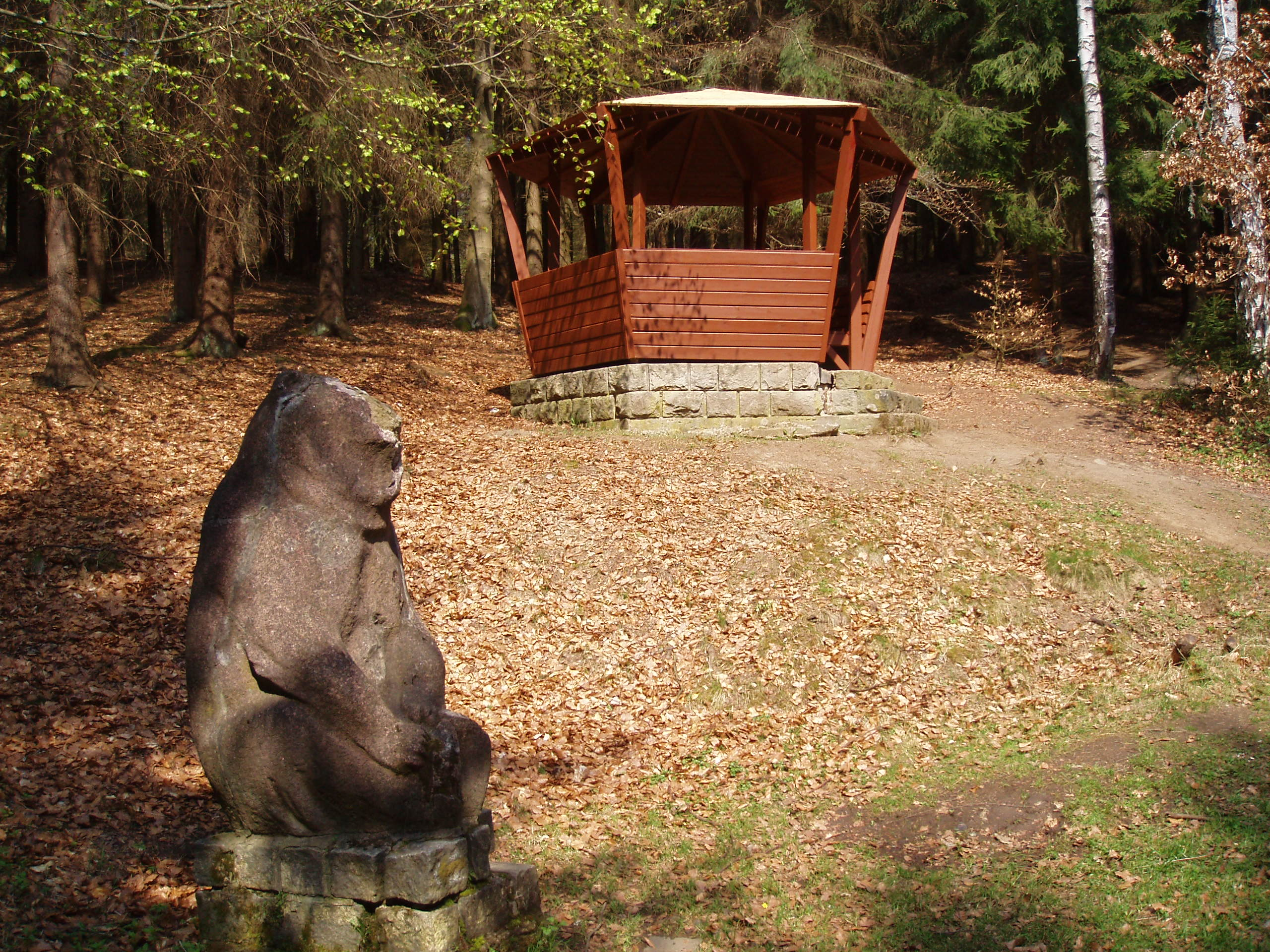 Altánek s medvědem u pramene